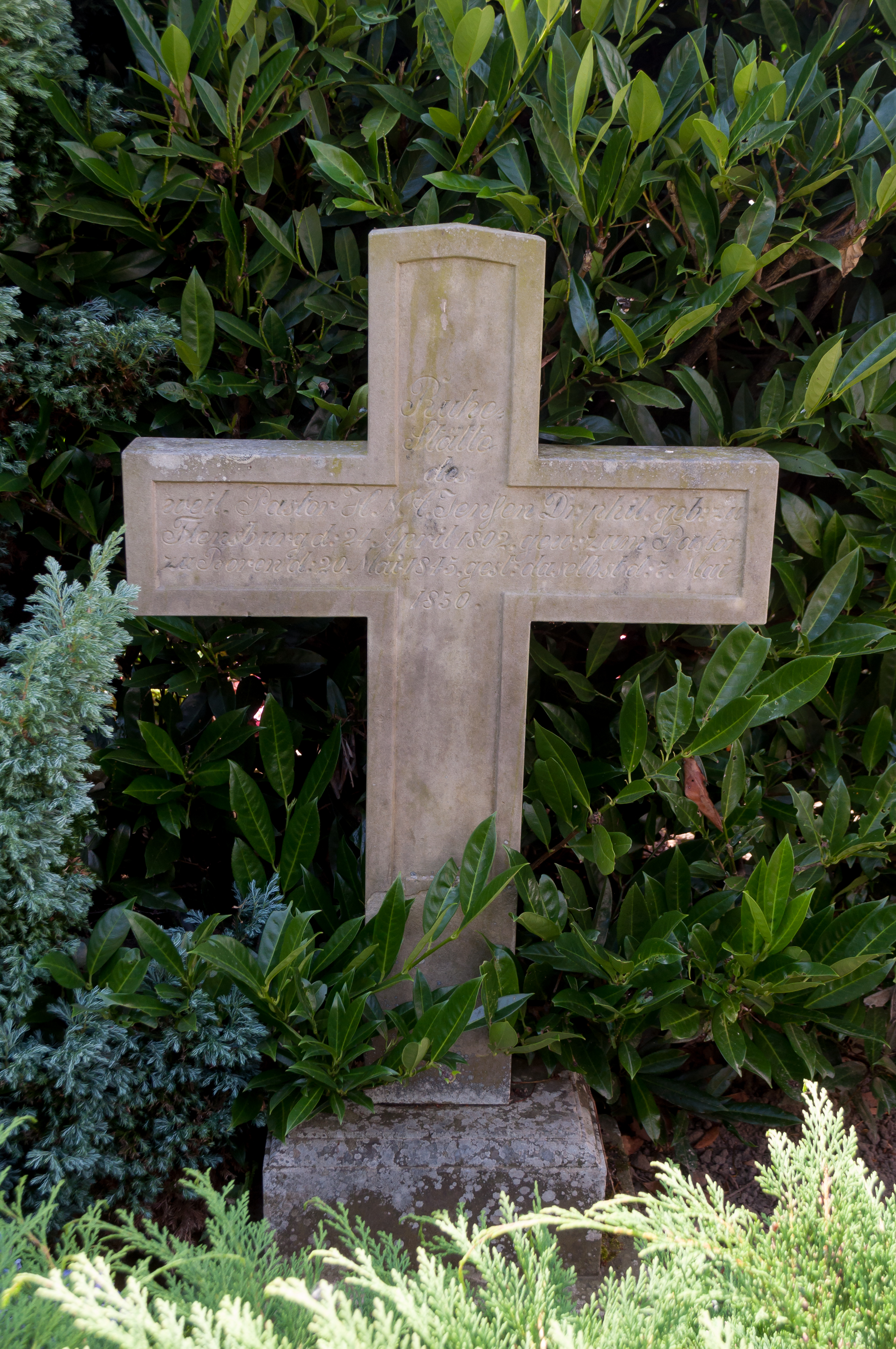 Grabkreuz für Pastor Dr. Jensen von 1850 im Kirchhof der Kirche St. Marien in Boren. This is a photograph of an architectural monument. .8